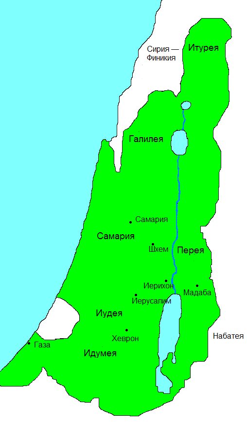 Rijk van de Hasmoneeën